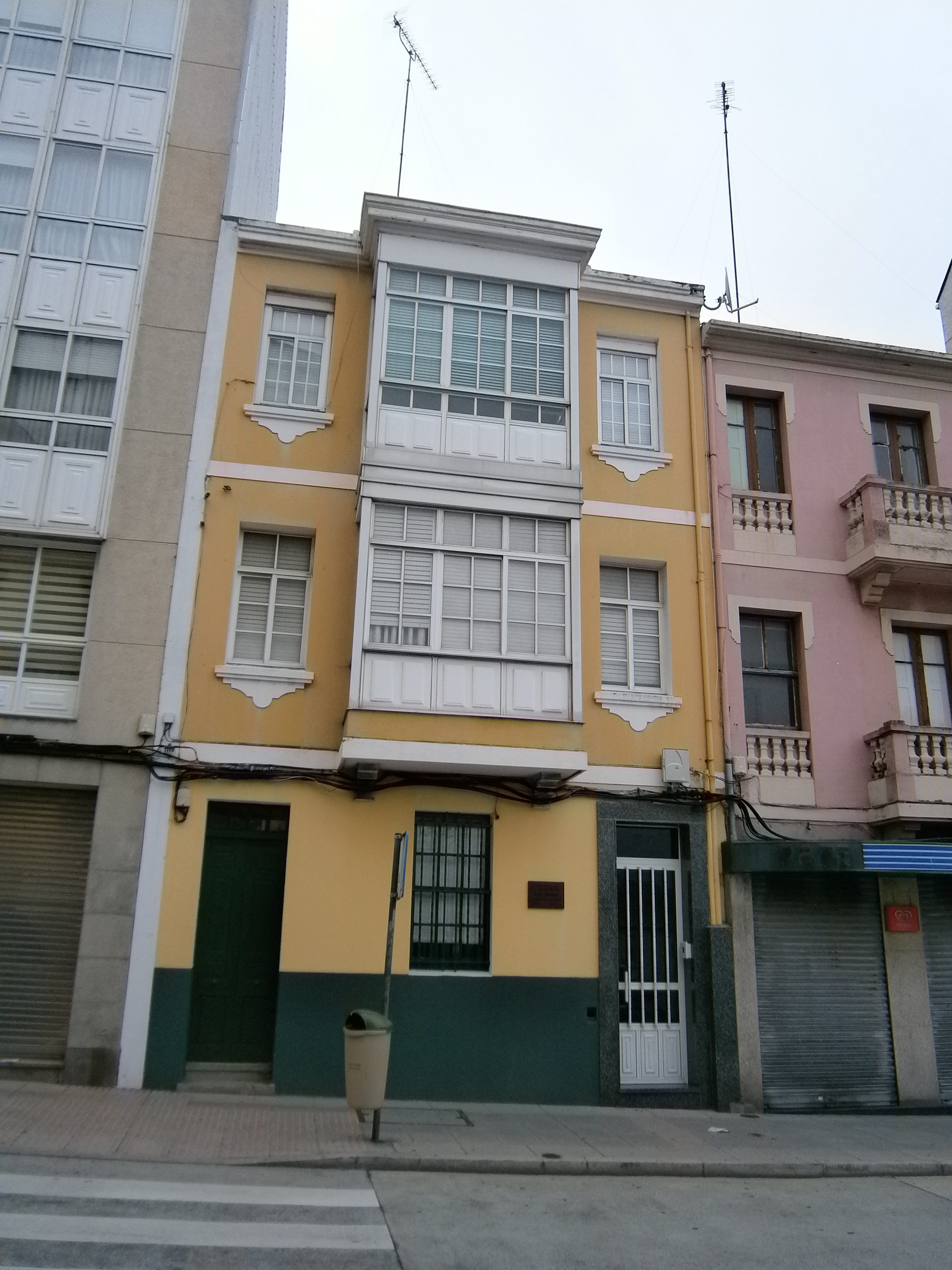 Casa natal de Luis Suárez Miramontes